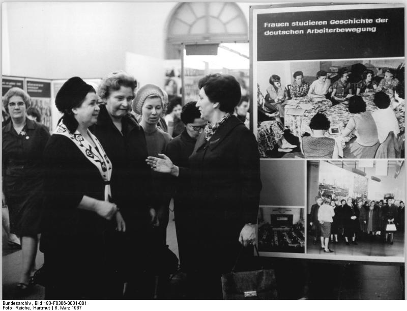 Zentralbild Reiche hsch-at 6.3.1967 Berlin: Ausstellung "20 Jahre DFD" im Museum für Deutsche Geschichte eröffnet. Ilse Thiele (rechts), Vorsitzende des DFD-Bundesvorstandes, in angeregtem Gespräch mit Olga Koltschina, Sekretär des Moskauer Parteikomitees und Kandidat des ZK der KPdSU (links). Olga Koltschina leitet die sowjetische Delegation, die an den Feierlichkeiten anläßlich des 20. Jahrestages des DFD teilnimmt. 2.v.l.: Hanna Blecha, Mitglied des Sekretariats des Bundesvorstandes des DFD, führte die Gäste durch die Ausstellung, die bis Ende März gezeigt wird.